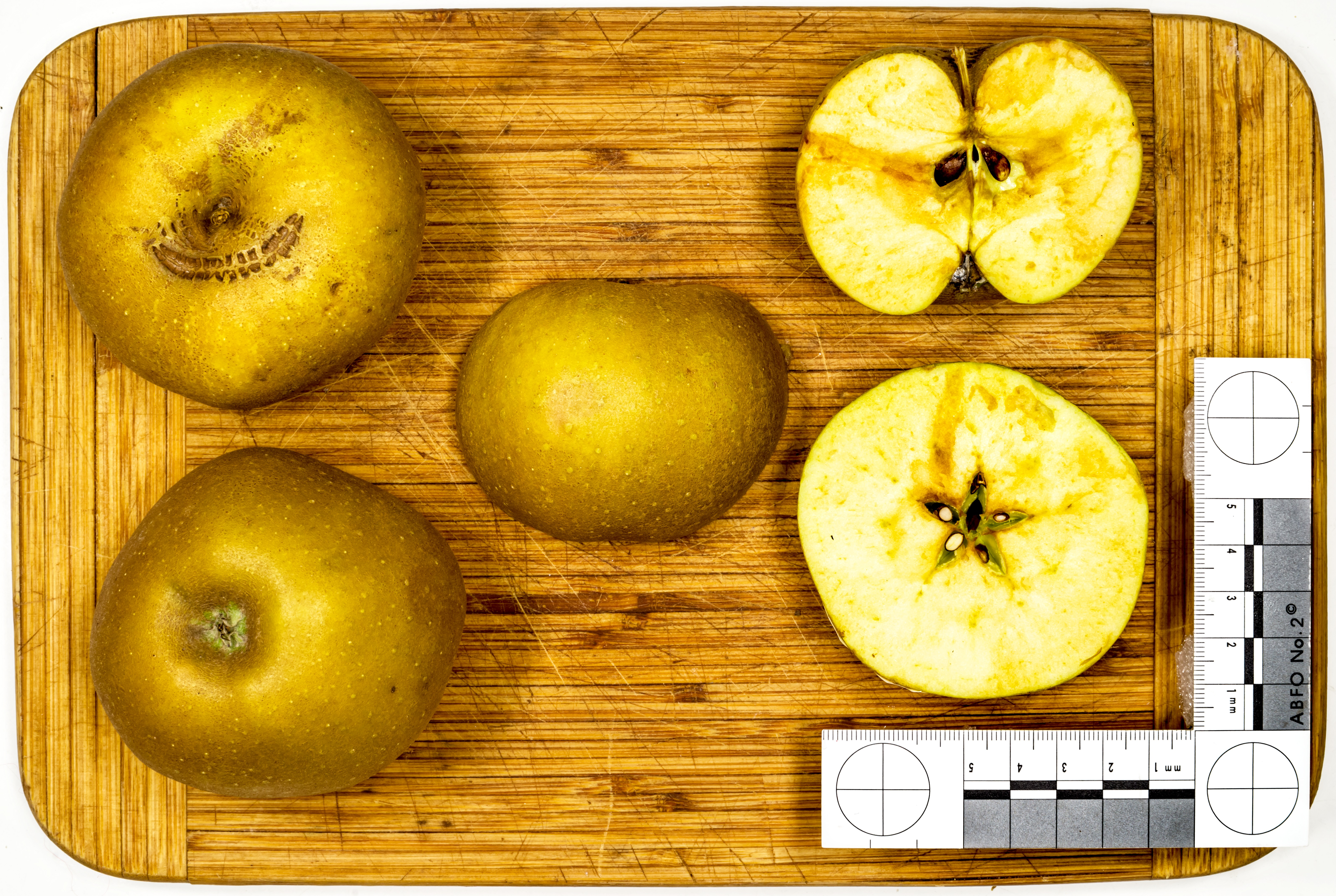 Apfelsorte Graue Kanada-Renette, Synonyme: Canada Gris, Graue Canada Reinette, Graue Canada-Reinette, Graue Reinette von Canada, Grise du Canada, Monstrueuse du Canada, Passe Pomme du Canada, Passe-Pomme du Canada, Reinette de Canada (Grise), Reinette de Canada Grise, Reinette du Canada Grise, Reinette du Canada Platte, Reinette Grise, Reinette Grise de Canada, Renet Cenusiu de Canada, Renet seryi kanadskii, Renetta del Canada Rugginosa, Renetta Grigia del Canada, Smaragda, Takapuna Russet